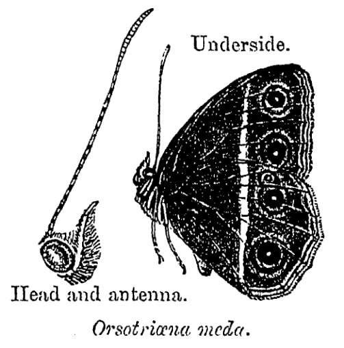 Orsotriœna medus = Orsotriaena medus (Fabricius, 1775)